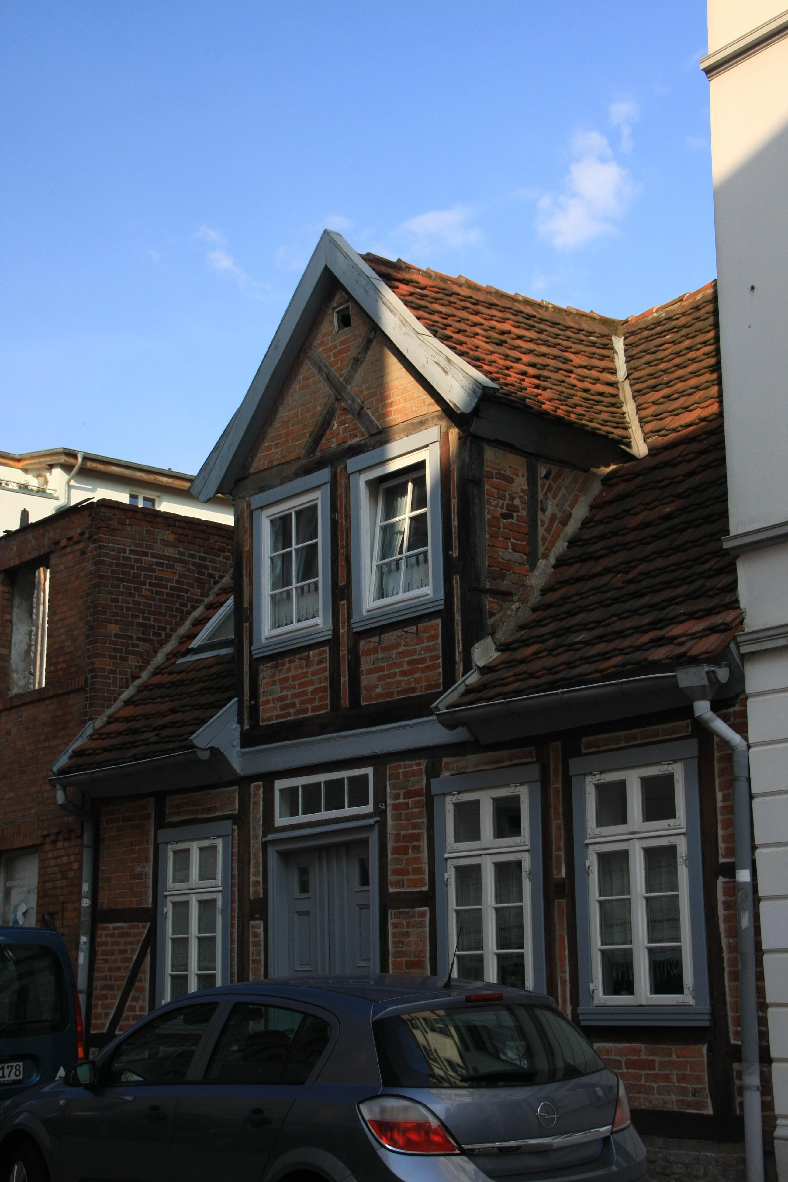 19055 Schwerin, Bergstraße 54